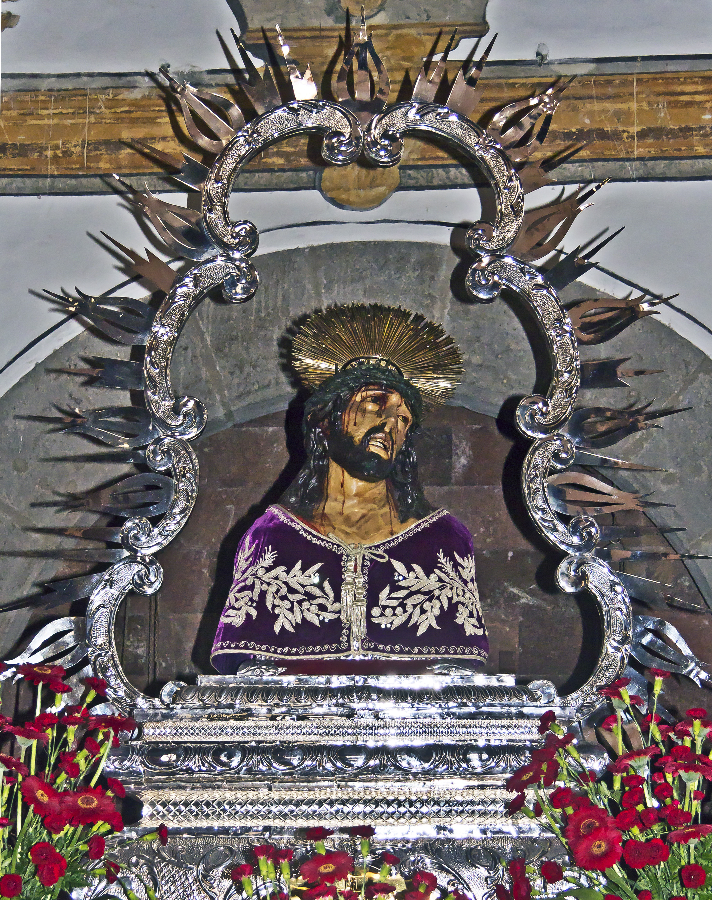 Die Figur des „Señor de las Tribulaciones“ befindet sich hier auf der Transporteinrichtung für die Prozession in der Karwoche in der Kirche San Francisco in Santa Cruz de Tenerife.